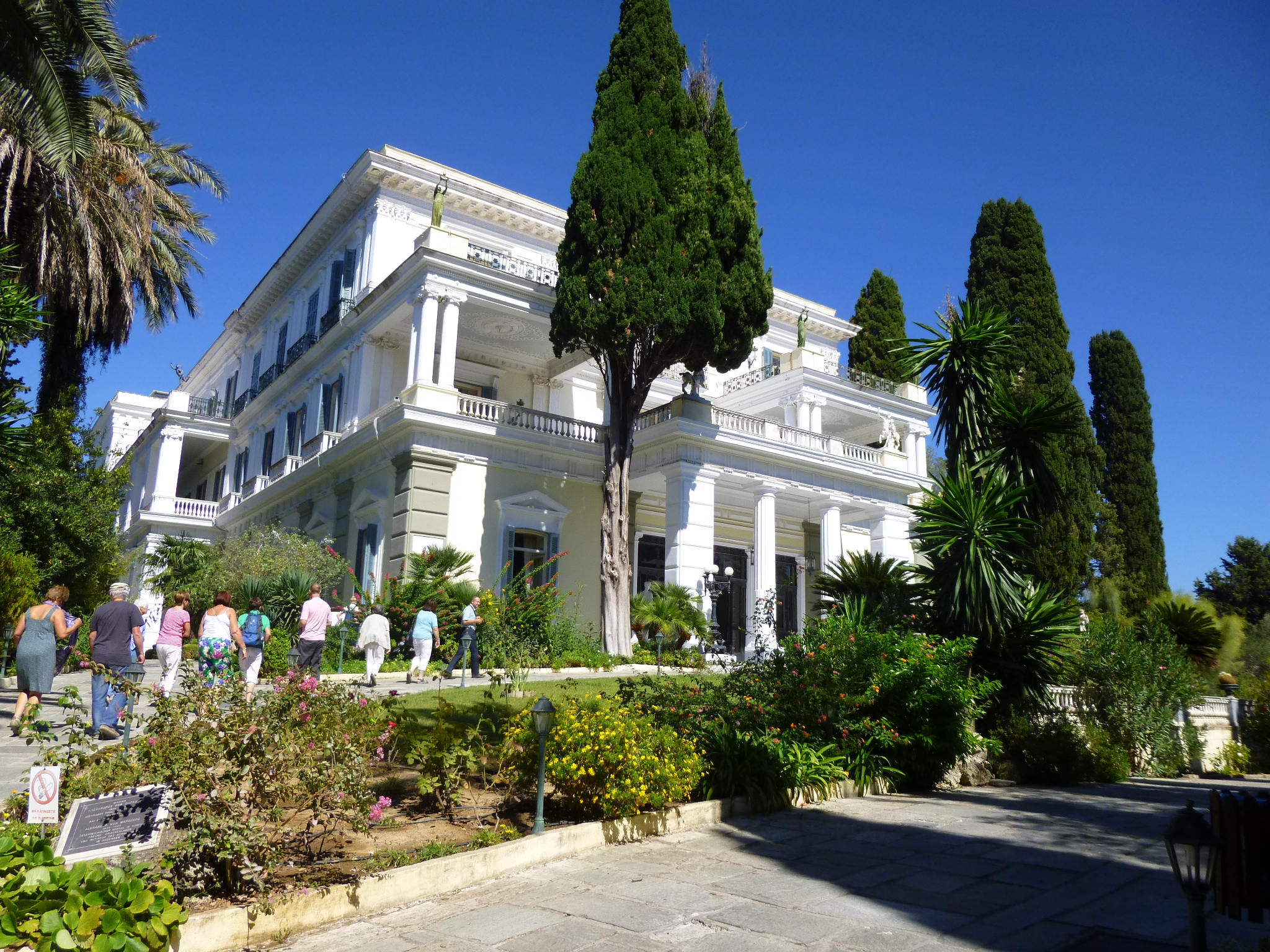 das Sissy-Schloss am hoch über der Hauptstadt Korfu